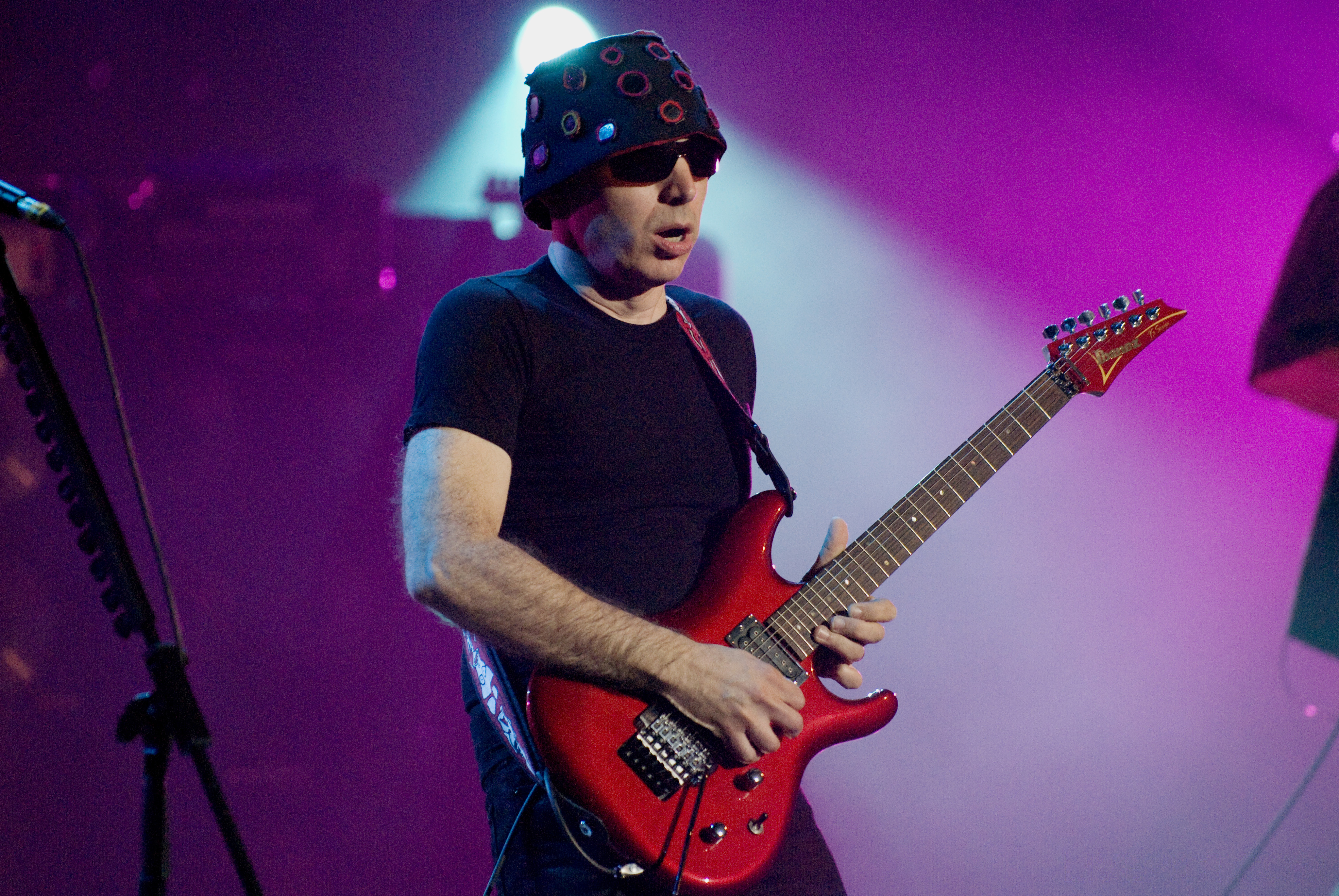 Joe Satriani